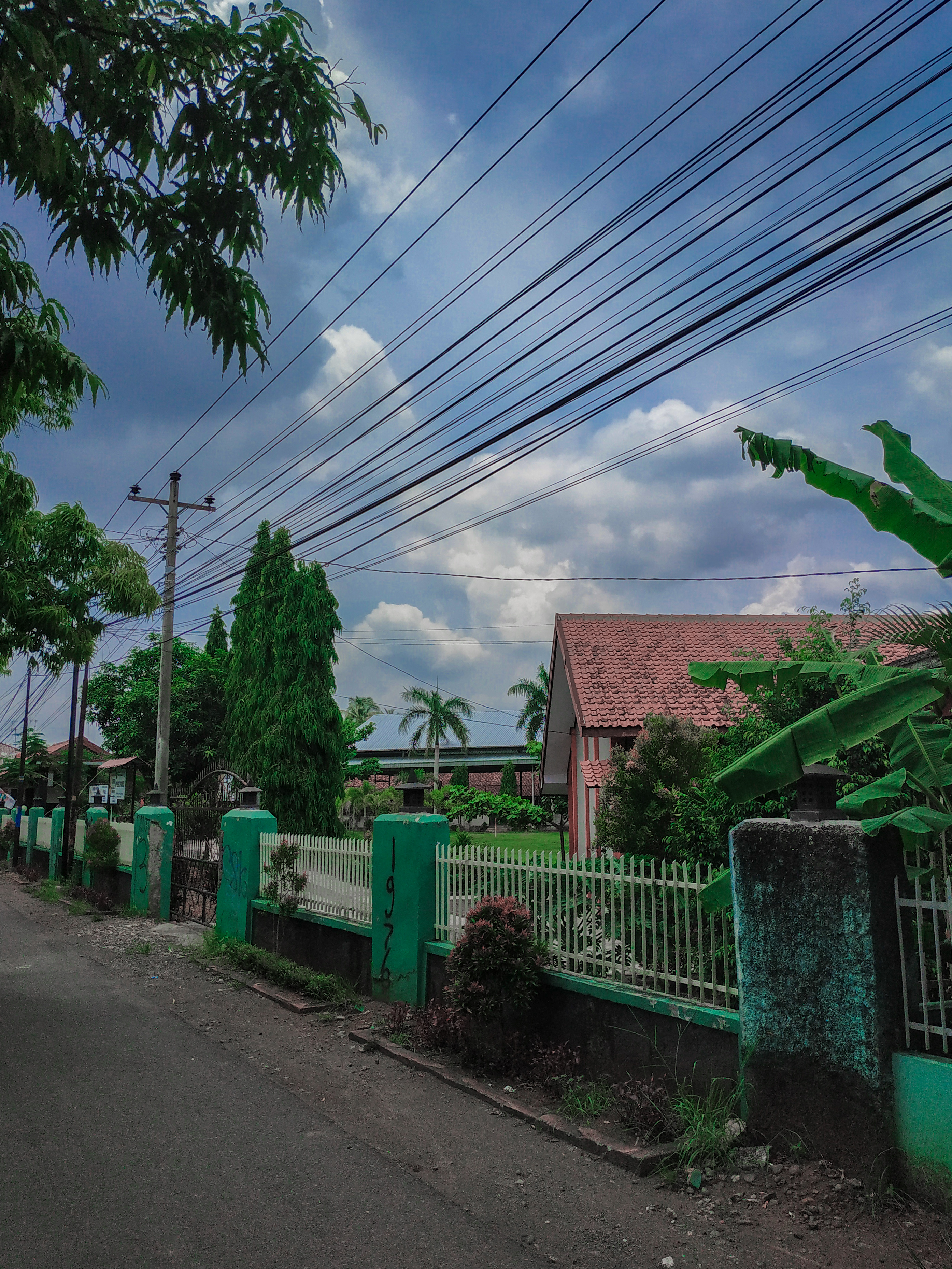 SMP Negeri 33 Purworejo dari arah utara